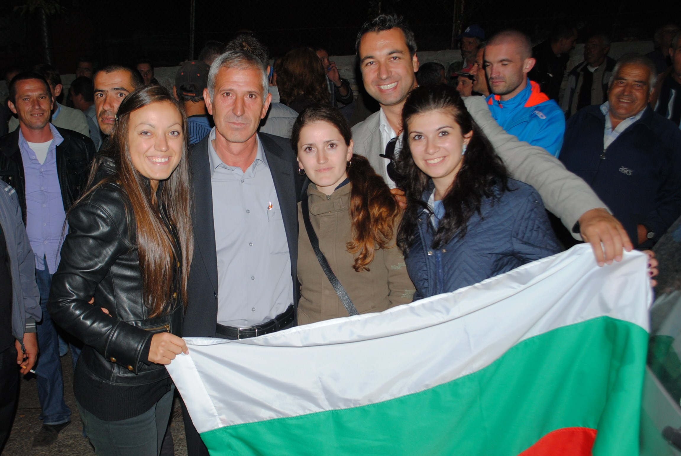 Венцислав Шишманов печели местните избори в Туховища на 14-ти октовмри 2012 г.